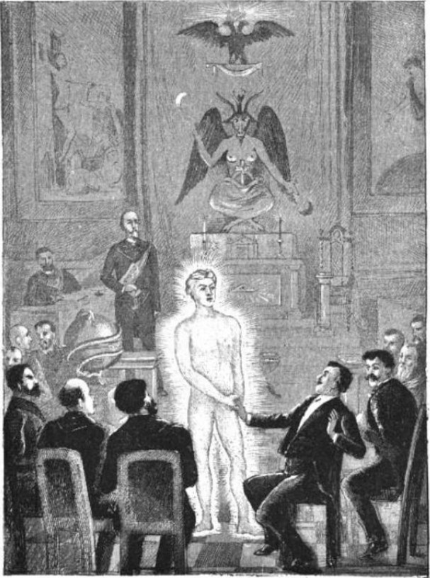 Illustration du Diable au XIXe siècle, page 9